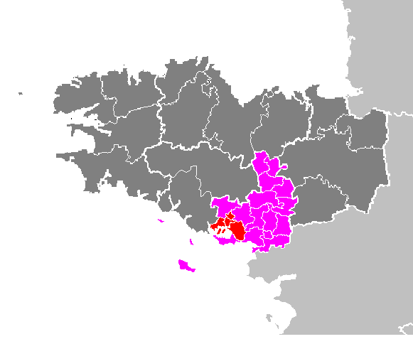 Maps of arrondissements and cantons of France: Arrondissement de Vannes - Cantons de Vannes.PNG